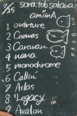 amiinAセトリボード